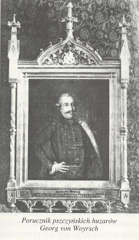 Rittmeister Georg von Woyrsch